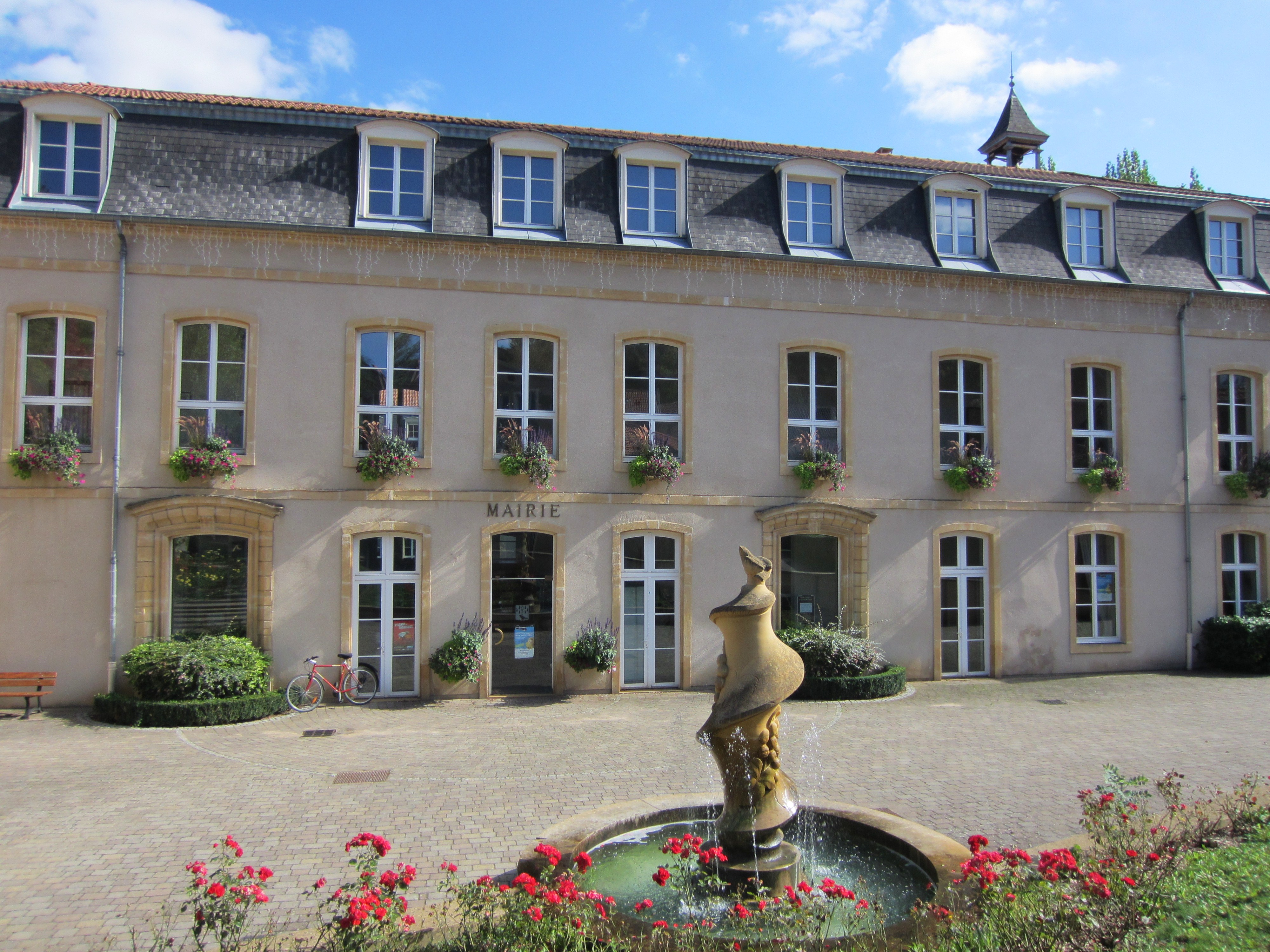 Description mairie château d'Arros Plappeville Date14 September 2011Sourcemon appareil photoAuthorAimelaimePermission(Reusing this file) mairie château d'Arros Plappeville